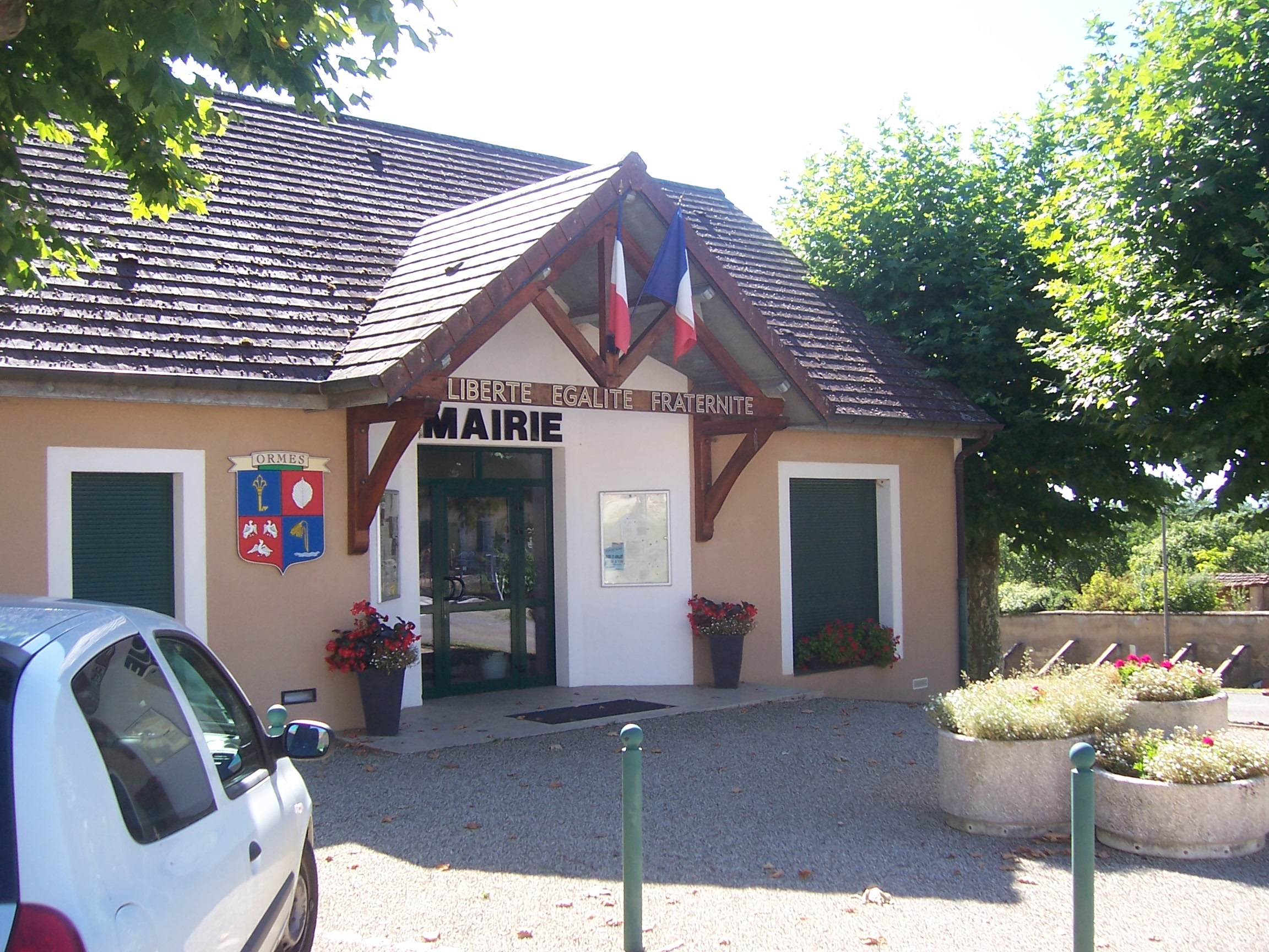 Mairie d'Ormes